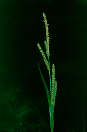 Sicilian botanical endemisms Carex panormitana